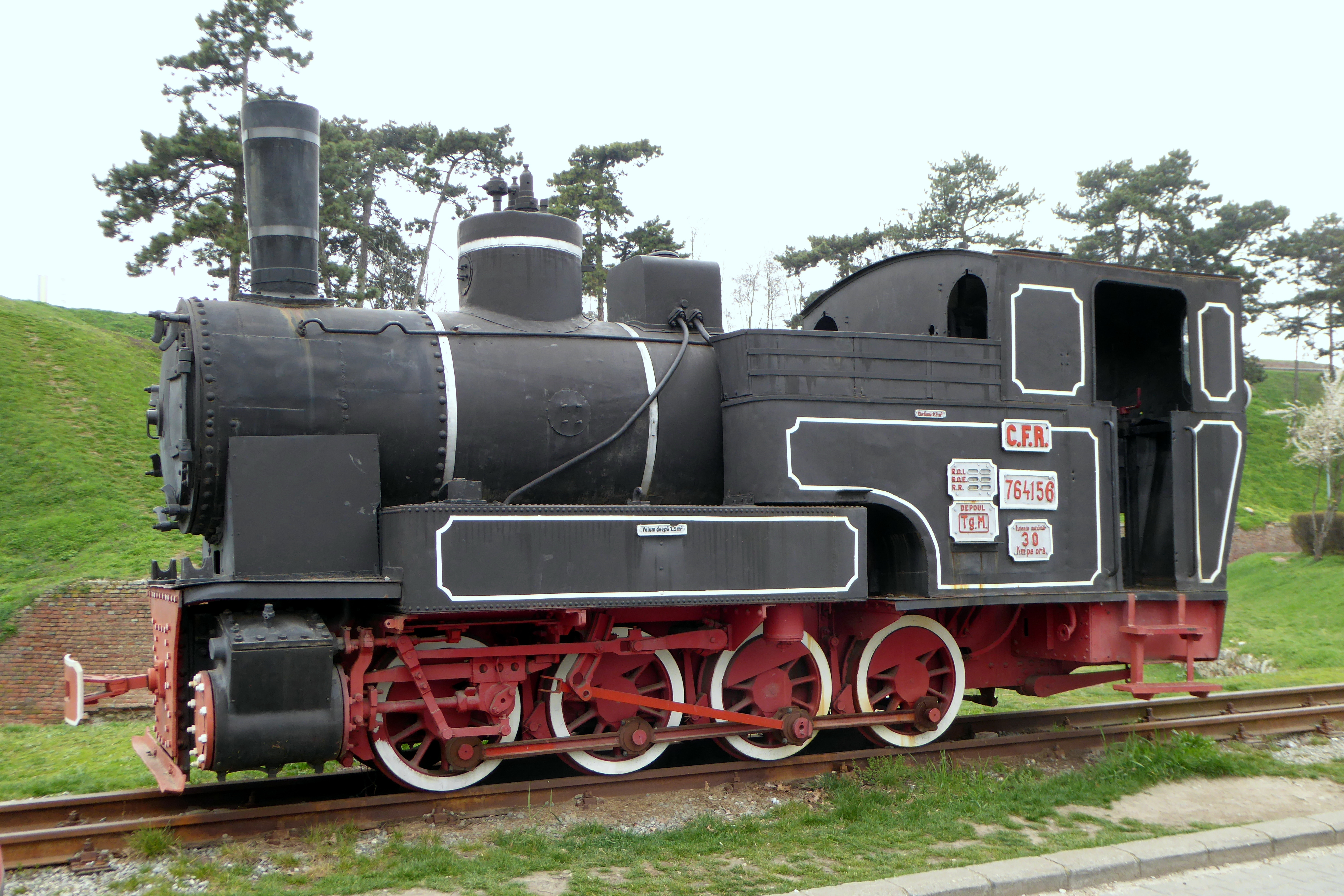 Die Schmalspurdampflokomotive 764156 in Alba Iulia (RO).